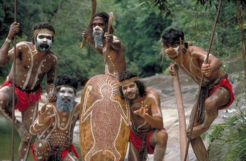 Аборигени